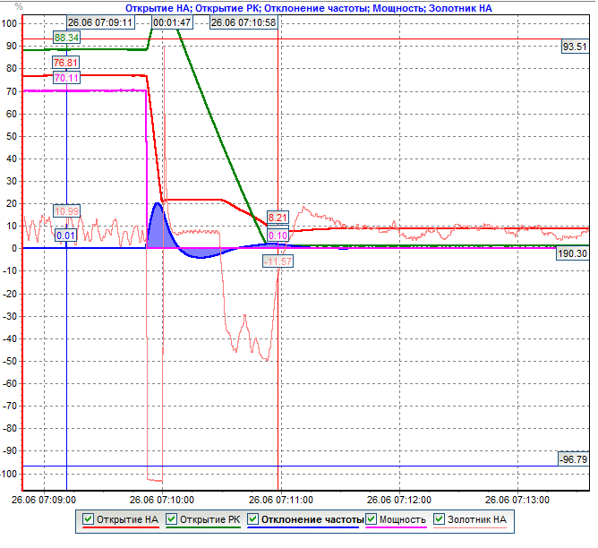 Переходный процесс отключения гидрогенератора от сети со сбросом нагрузки и возвратом на холостой ход